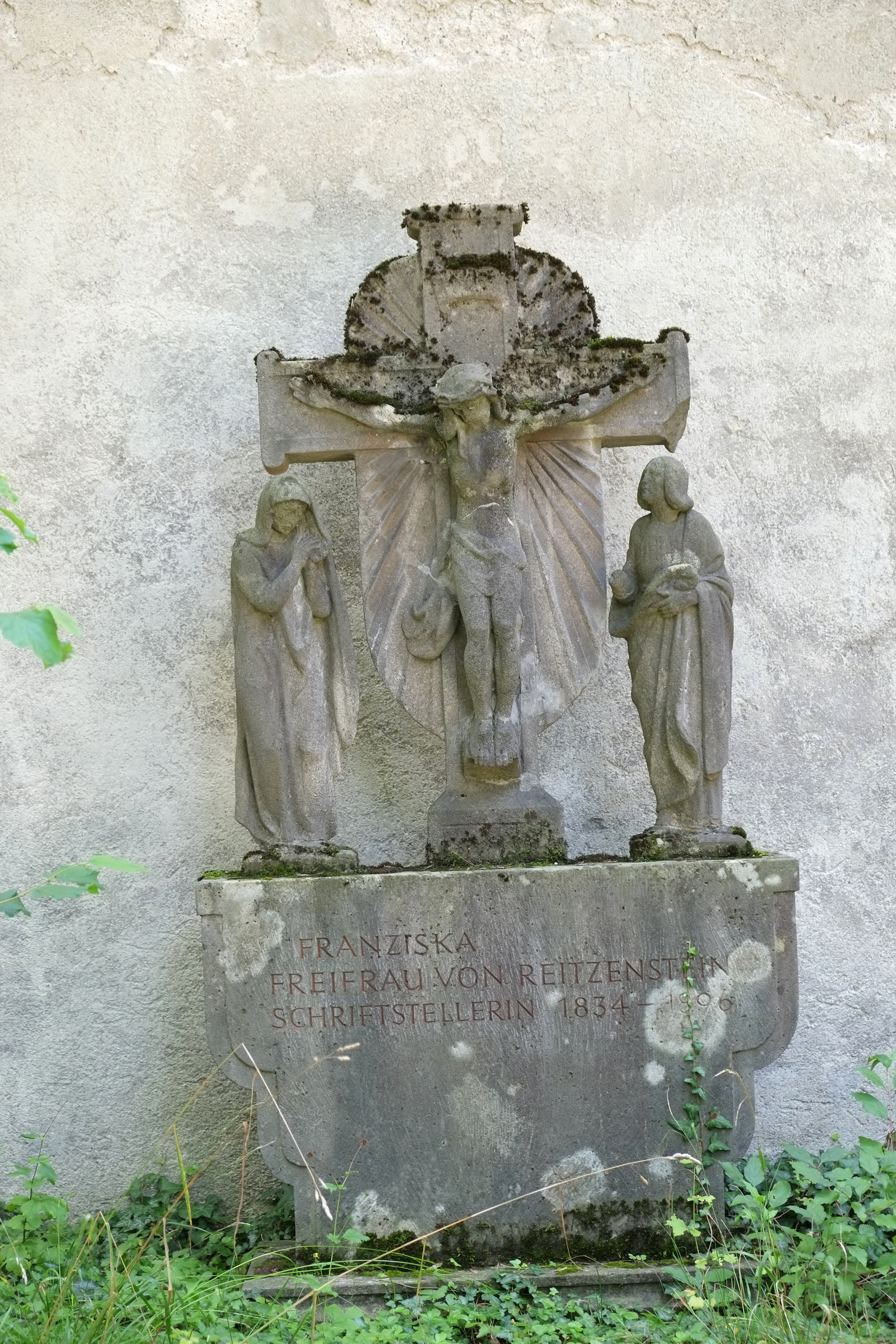 Grabstein für Franziska von Reitzenstein auf dem Alten Südfriedhof in München (Bayern, Deutschland)